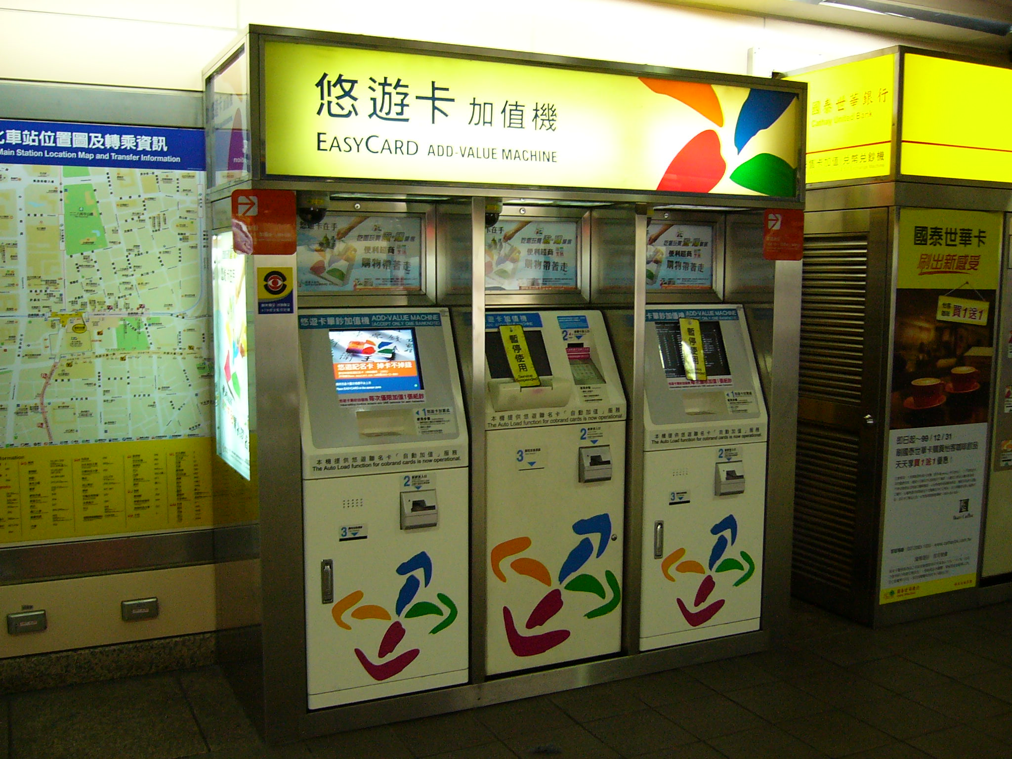 台北捷運台北車站悠遊卡加值機。